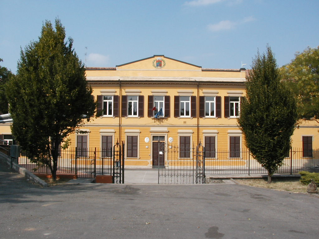 Montù Beccaria (PV) La scuola (Foto di Luigino C.)